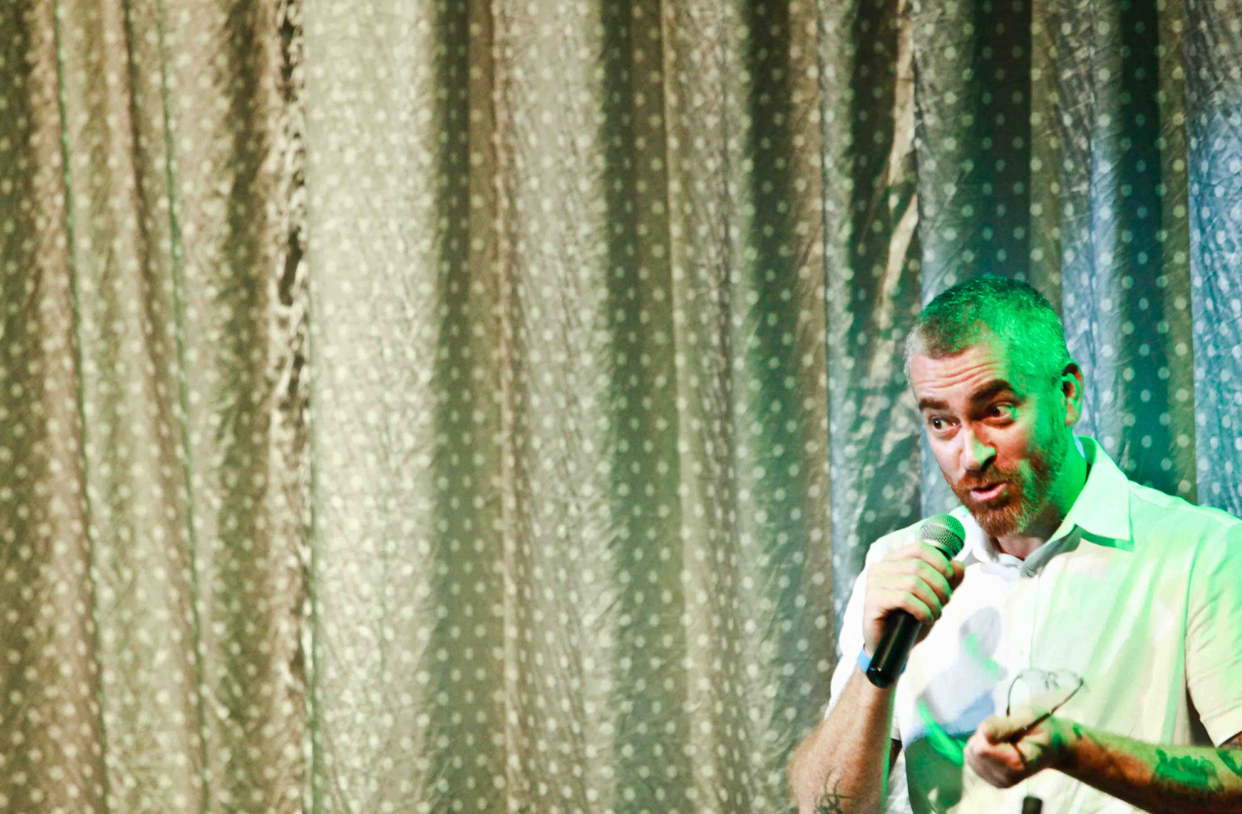 Alex Atala. Foto Cacá Meirelles